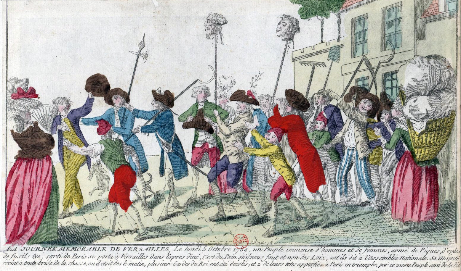 La Journée memorable de Versailles le lundi 5 octobre 1789 : dans cette émeute generale plusieurs gardes du corps ont été massacrés deux dentre eux furent décolés et leurs tetes portées en triomphe par ce même peuple ami de la liberté nationale